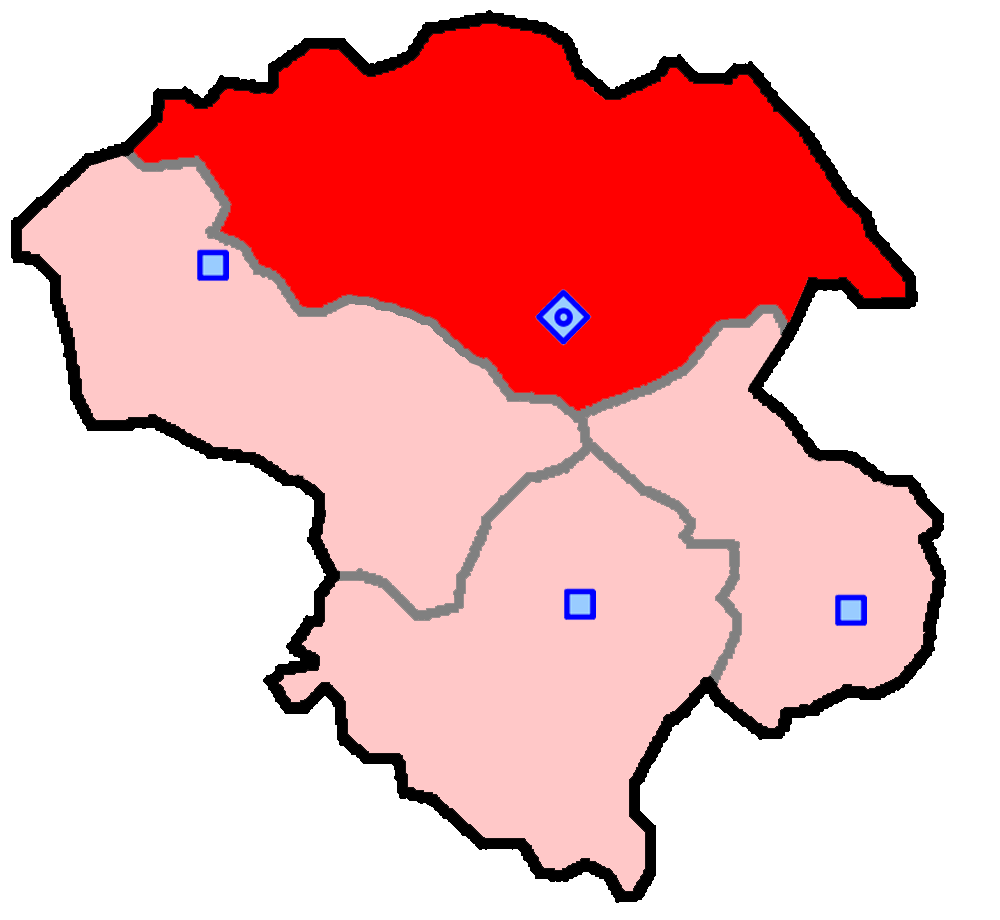 حوزهٔ انتخاباتی زنجان و طارم برای انتخابات مجلس شورای اسلامی